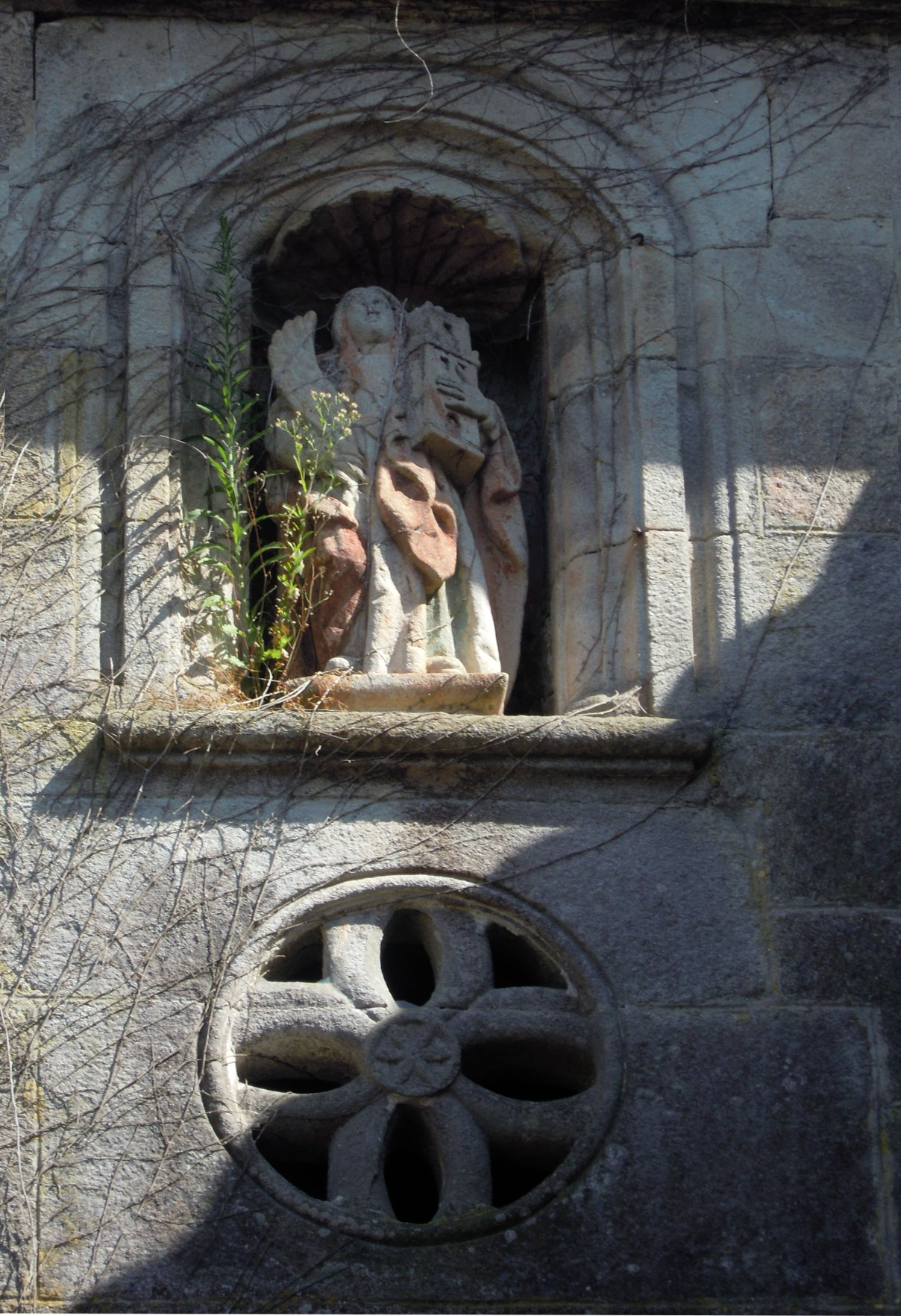 Imaxe de Santa Bárbara e rosetón na porta da capela do pazo de Cadro.